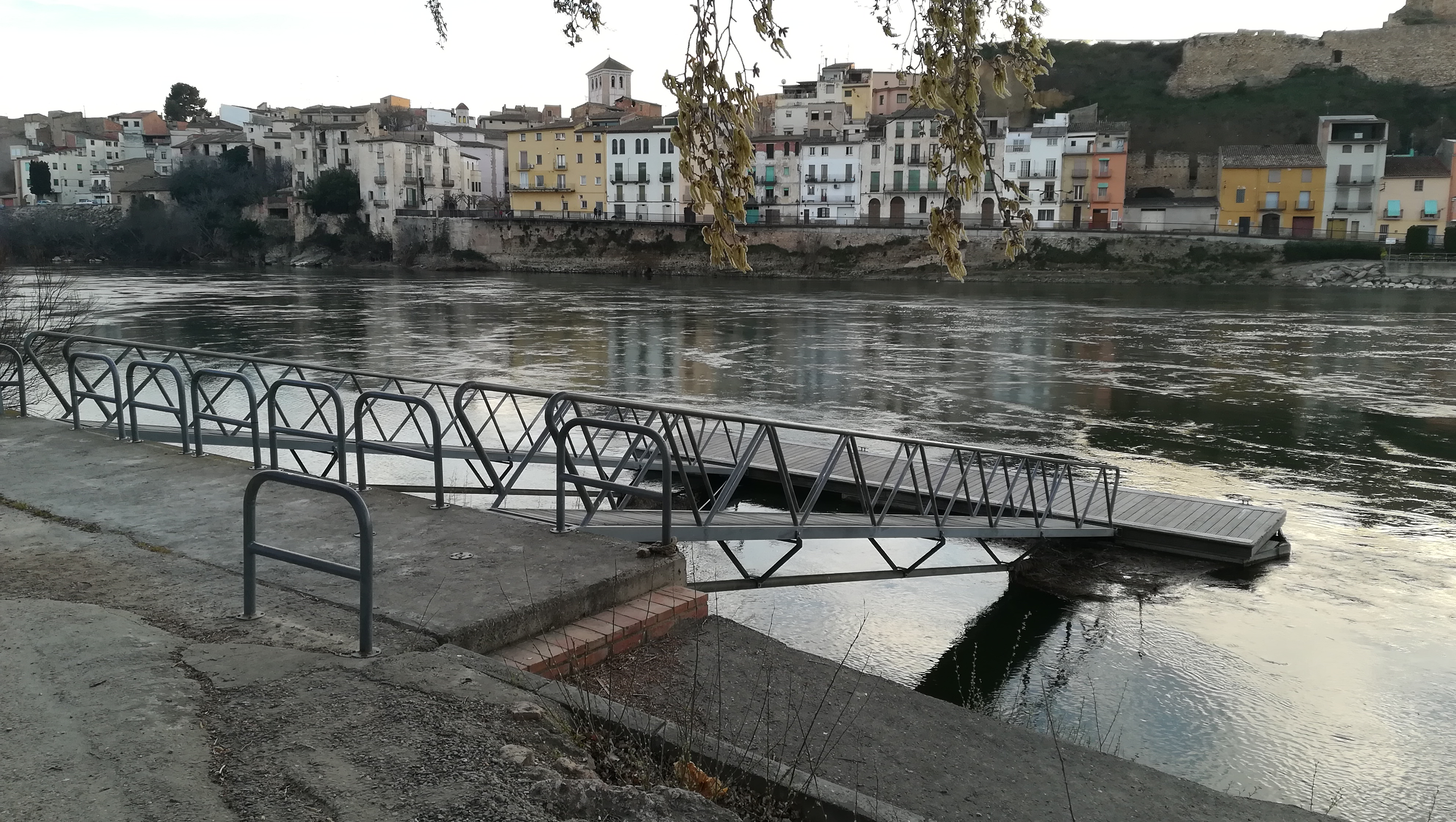 Embaracodr mln